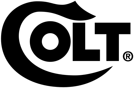 Colt logo